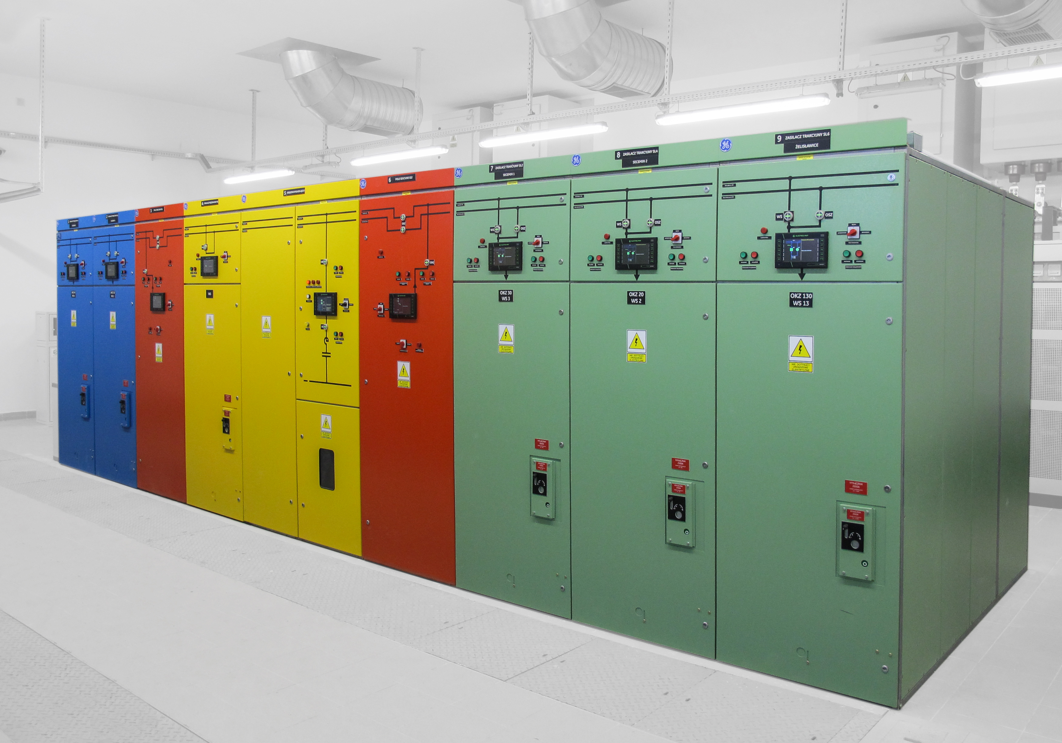 Rozdzielnica prądu stałego 3kV DC z automatyką zabezpieczeniową CZAT produkcji ELESTER-PKP